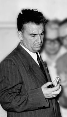 Zentralbild Hesse 14.7.1958. Ausländische Gäste zum V. Parteitag besuchten Berliner Glühlampenwerk. Gäste aus der Volksrepublik Albanien sowie aus Basilien und Marokko, die als Gäste zum V. Parteitag in Berlin weilten, besuchten am 14.7.1958 die Werktätigen des VEB Berliner Glühlampenwerk. UBz.: Das Mitglied des Politbüros des ZK der Partei der Arbeit Albaniens, [Gogo] Nushi , bei der Besichtung des Werkes.